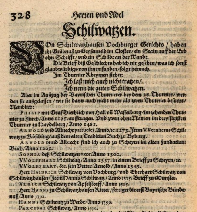 Eintrag der Schilwazen bei Wiguleus Hund 1595